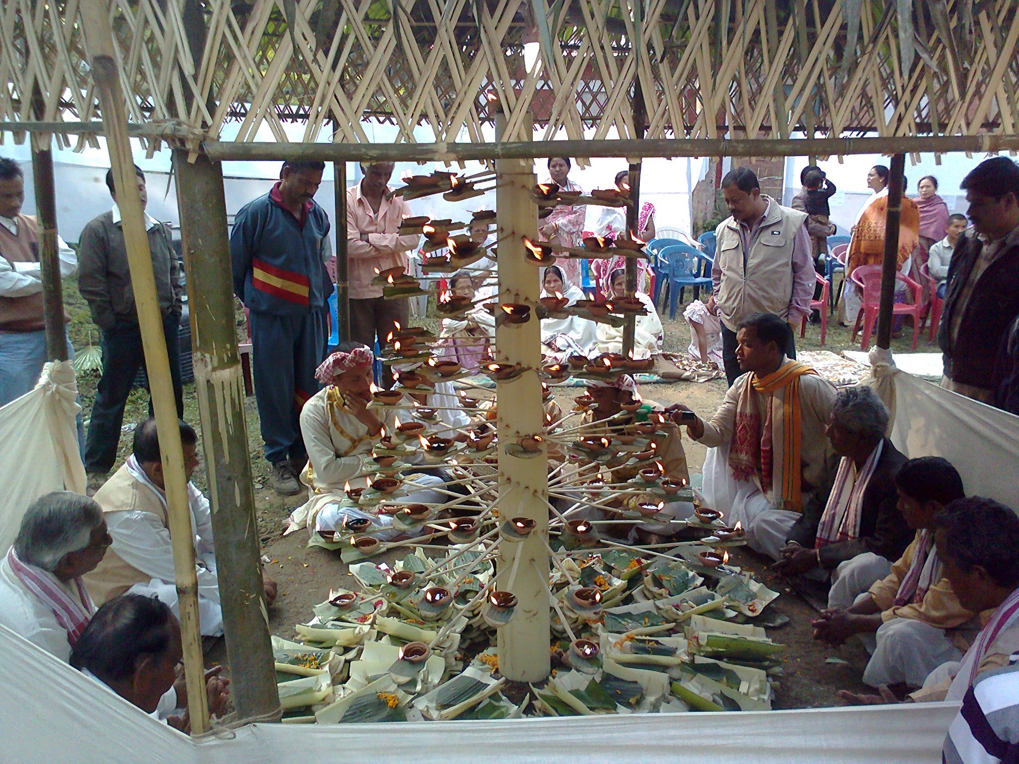 অসমীয়া: পূৰ্বপুৰুষলৈ শ্রদ্ধাঞ্জলি জনাই কৰা আহোম সকলৰ ফুৰালুং পূজা